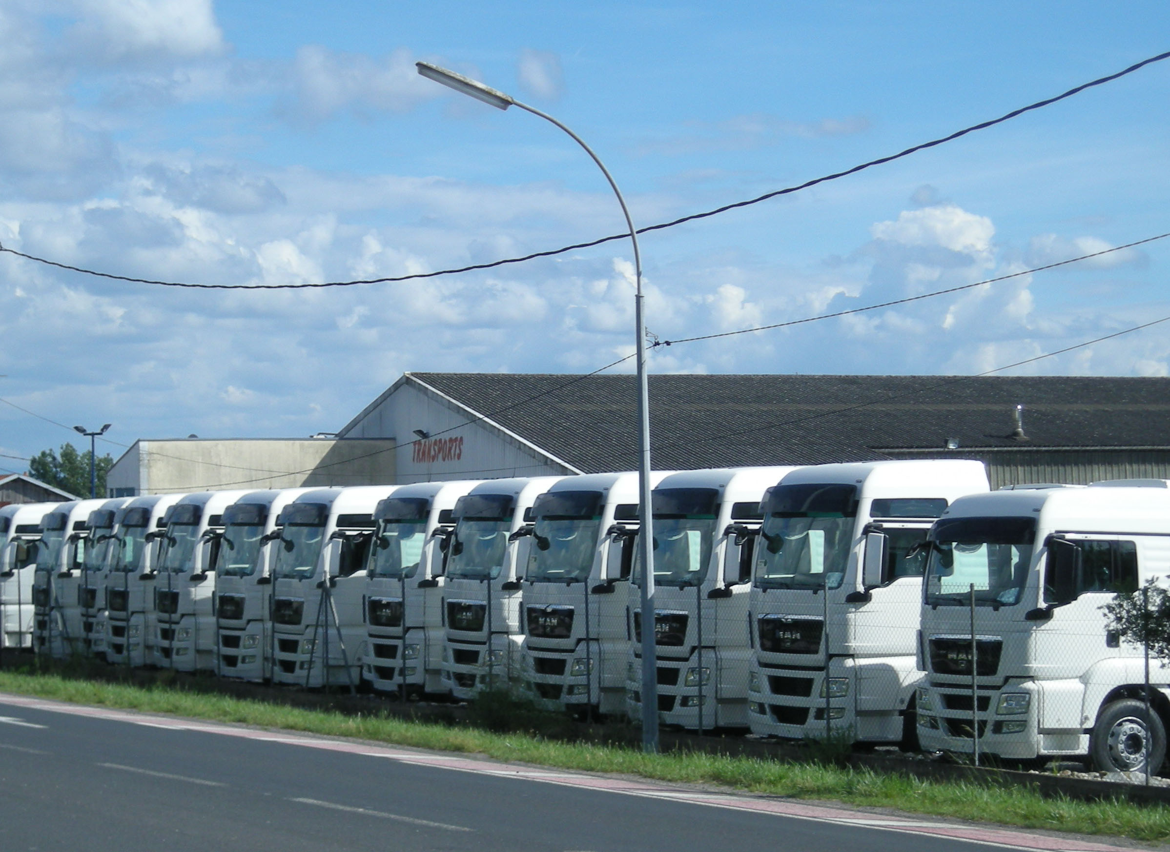 Entreprise de transport à Azerailles (Meurthe-et-Moselle)